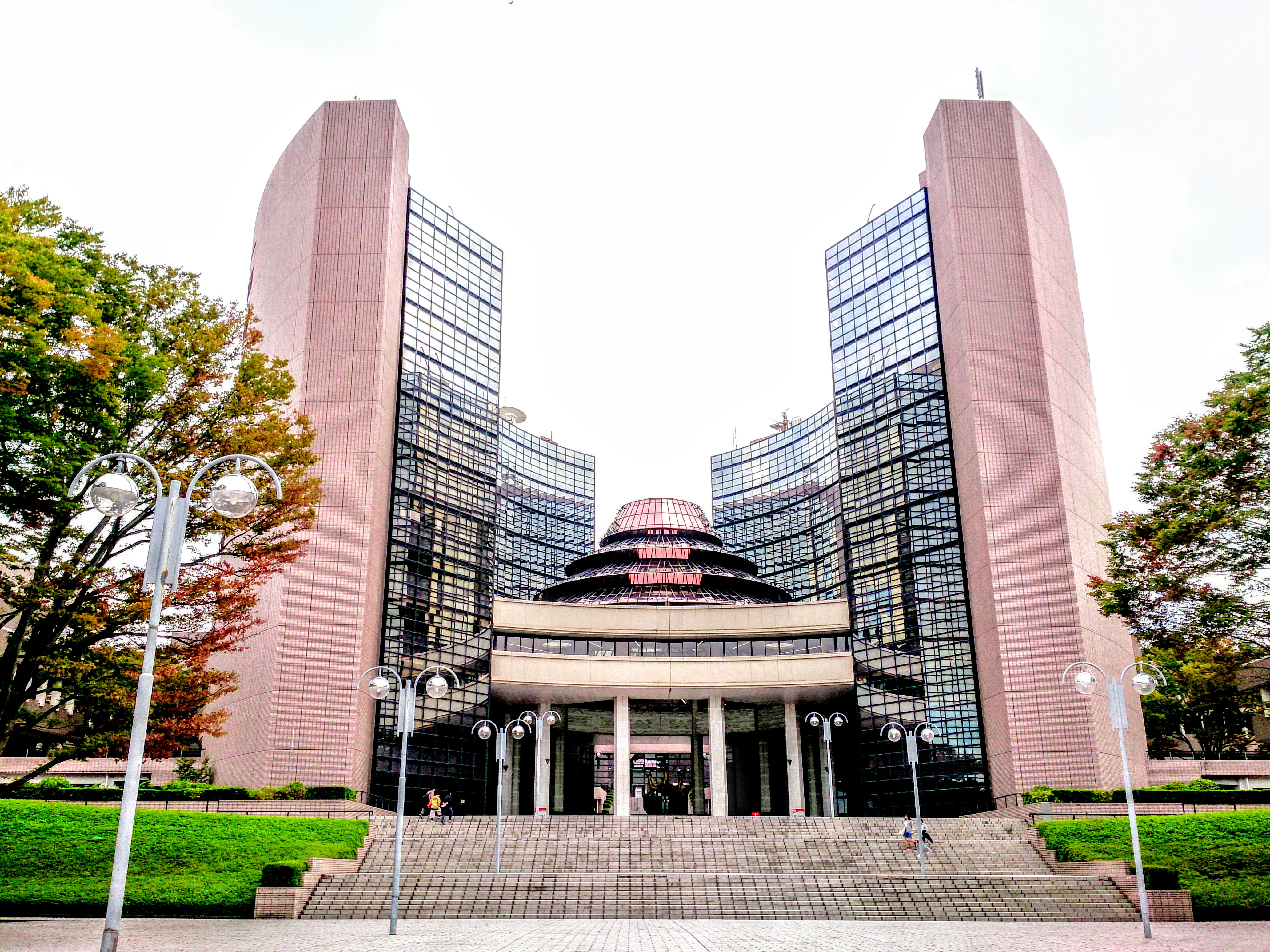 日本工学院専門学校八王子 研究棟